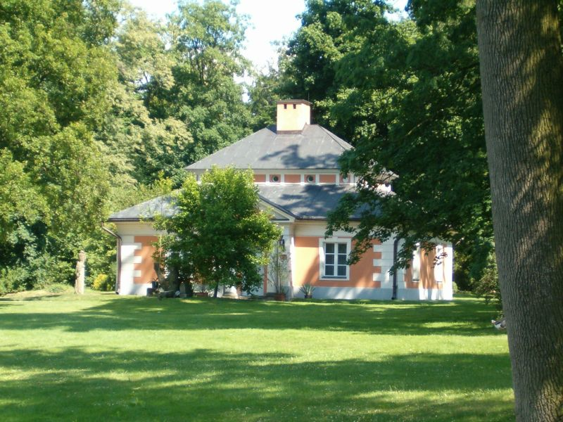 Dobrzyca, ul. Pleszewska 5A - zespół pałacowy: dom ogrodnika (oficyna) z końca XVIII w. (zabytek nr 4/A)